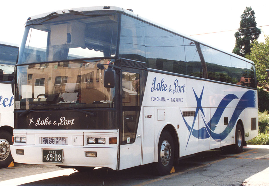 相模鉄道 レイクアンドポート 専用車